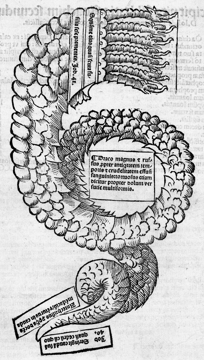 Siebenköpfiger Drache, der die sieben Verfolgungen der christlichen Kirche symbolisiert; Holzschnitt aus: Joachim von Fiore: Expositio in librum Cirilli de magnis tribulationibus & statu sancte matris ecclesie cum compilatione Theolosphori de Cusentia (u. a. Schriften), Venedig, B. Benali, (1516)